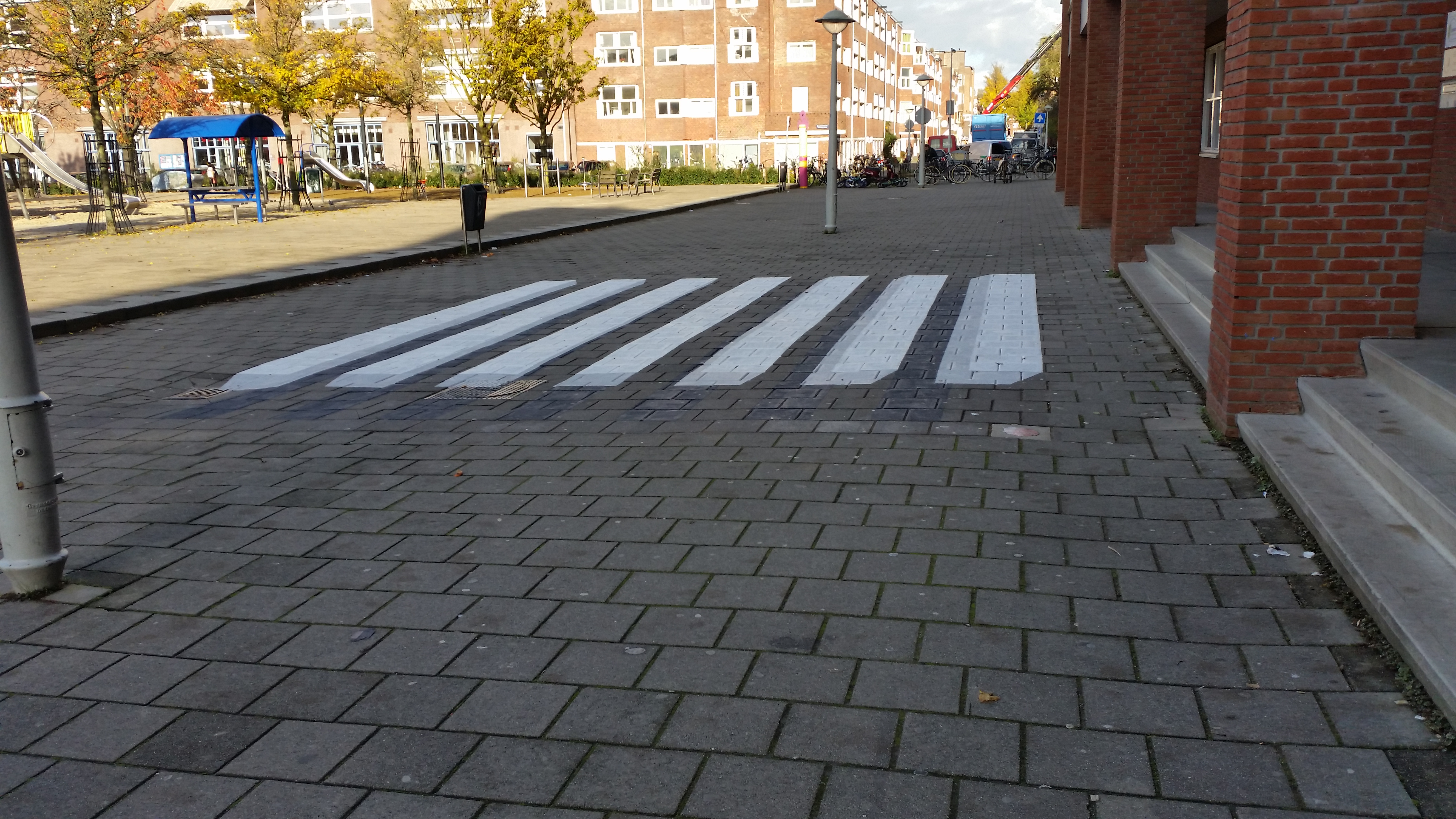 Test met 3D-Zebrapad op het Balboaplein, Amsterdam-West; kunstenaar Bert Wouters